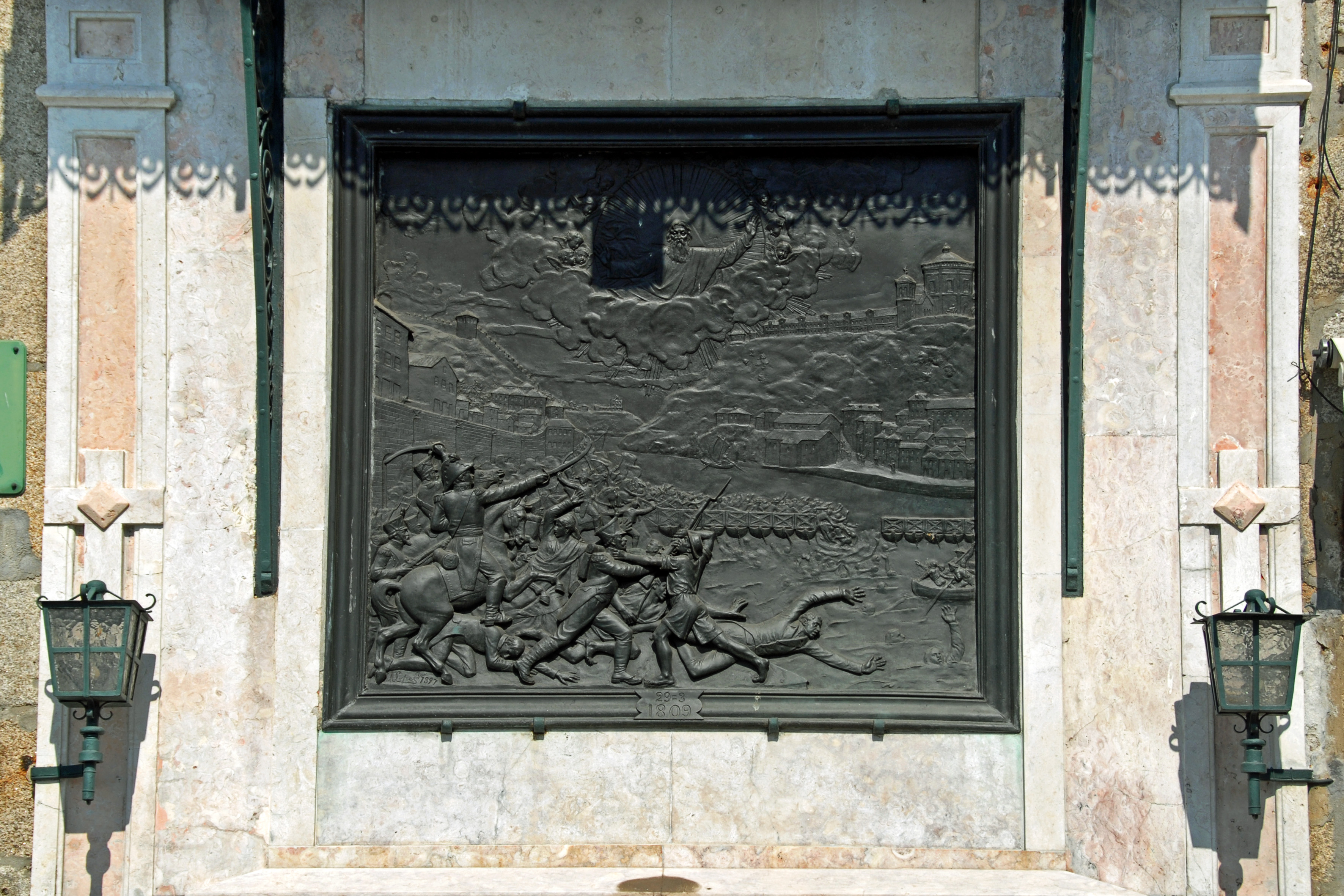 Alminhas da Ponte This file was uploaded for Wiki Loves Monuments in Portugal with the unique identifier 71533.